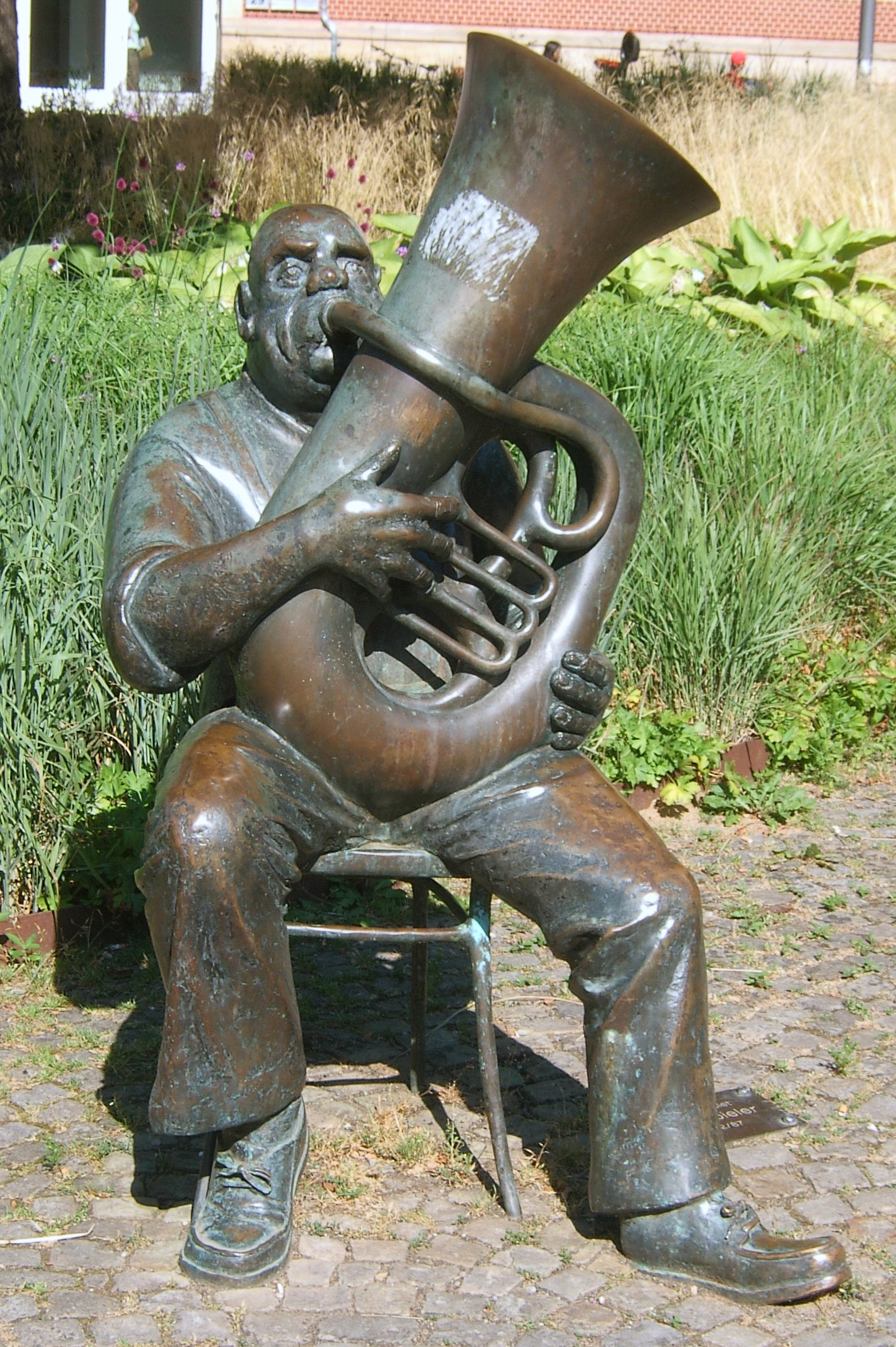 Hamburg, Harburg, Arne Ranslet "Tubaspieler" 1982-87